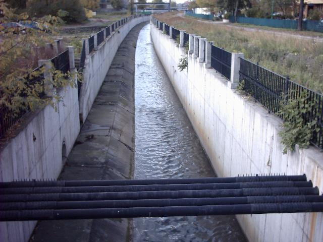 Katowice Zawodzie - rzeka Rawa i jej bulwary, 2005r.